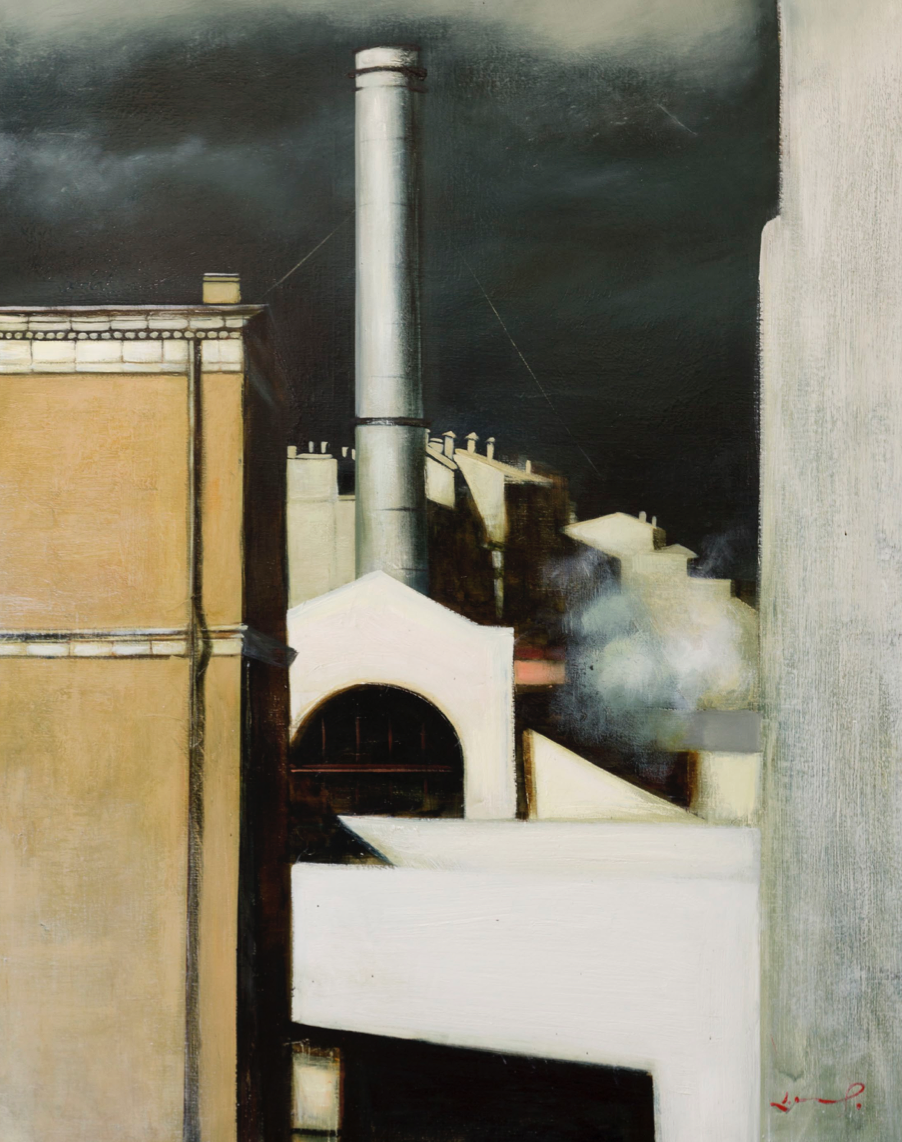 Москва